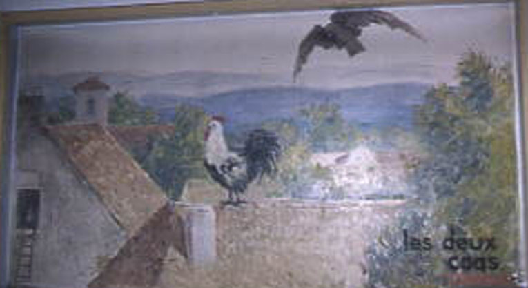 illustration de la fable de Jean de La Fontaine: Les deux coqs ; Livre VII fable XII